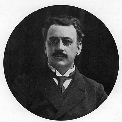 Carl Deurell